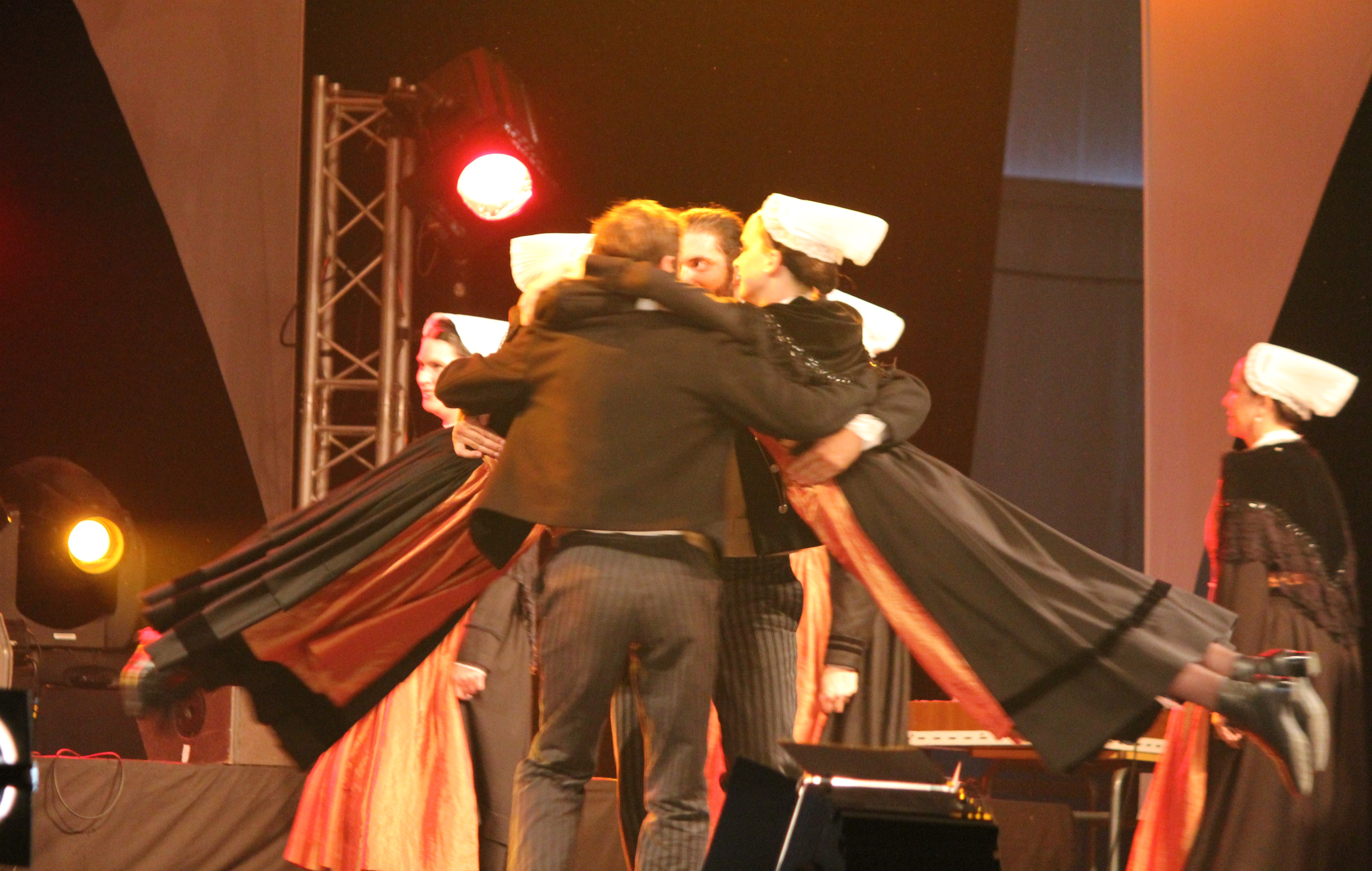 Danse Pastourelle par un cercle celtique breton.